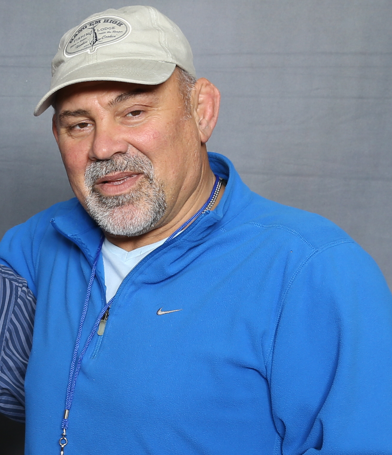 Scott Steiner (à gauche), un fan de catch et Rick Steiner.